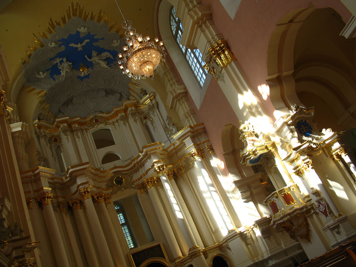 Беларуская (тарашкевіца): Полацак